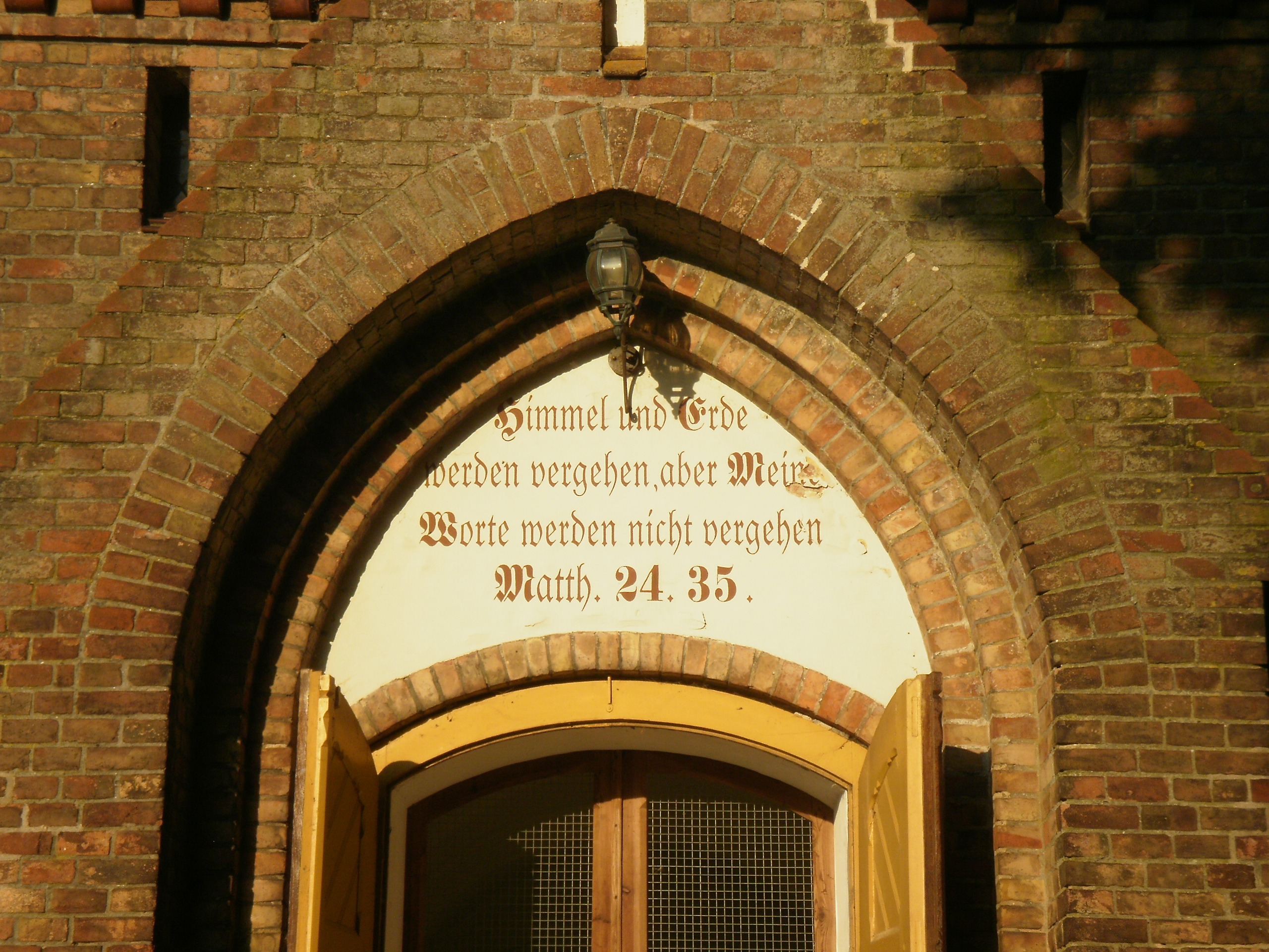 Spruch über dem Eingangsportal der Dorfkirche Golchen: "Himmel und Erde werden vergehen, aber Meine Worte werden nicht vergehen. Matth. 24.35"